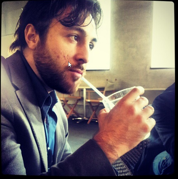 Foto Cubeddu Marco, scrittore